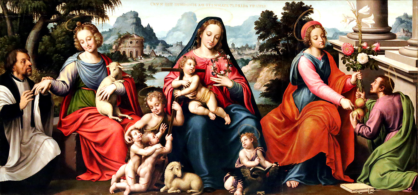 La obra representa las bodas místicas del venerable sacerdote Joan Baptista Anyés (1480-1553).